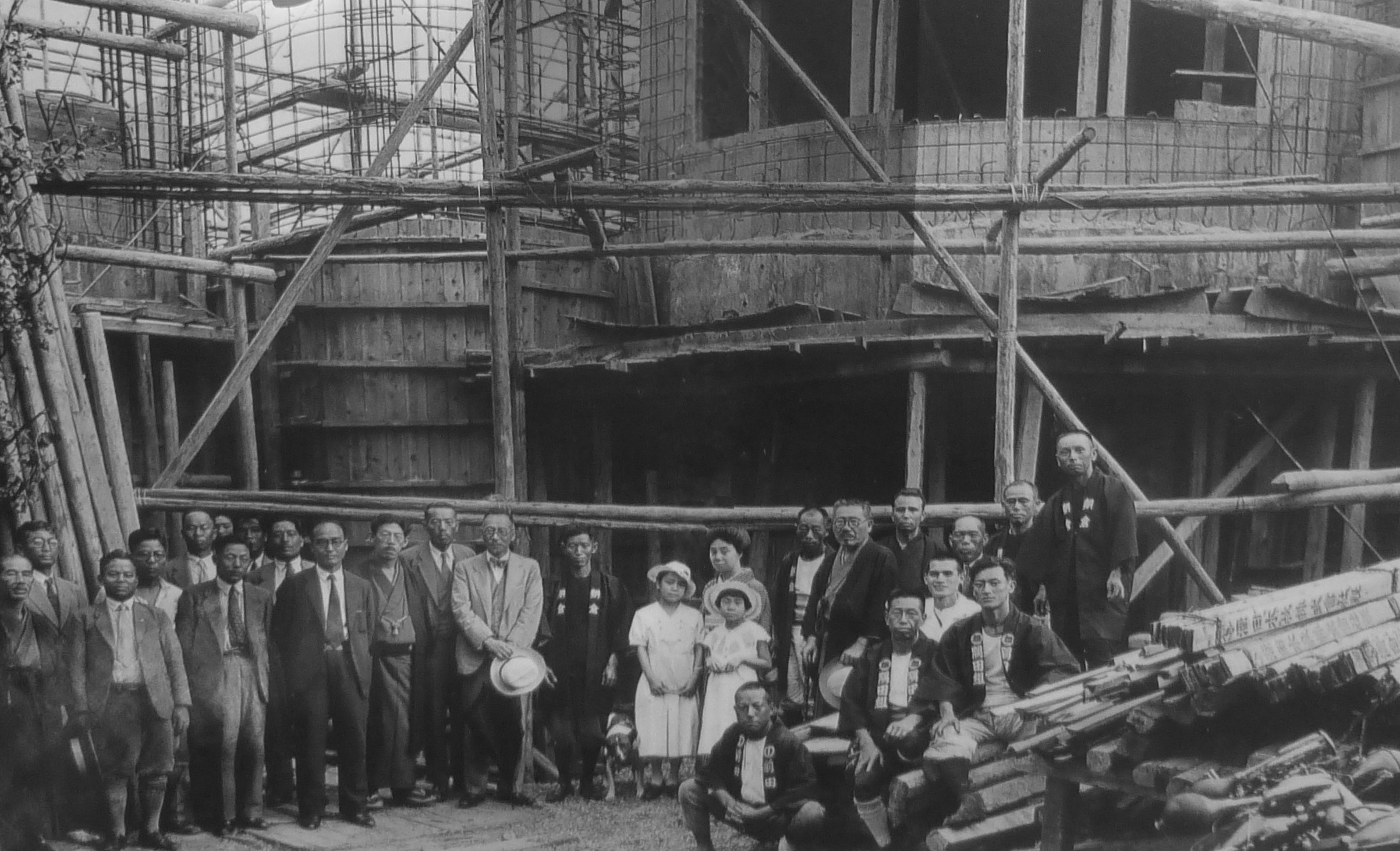 朝倉彫塑館（あさくらちょうそかん, Asakura Museum of Sculpture）